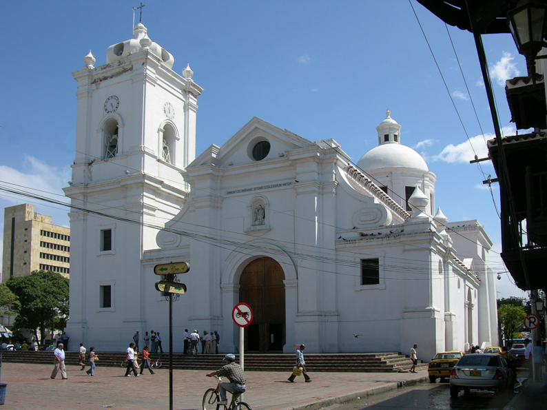 Sector Antiguo de la ciudad de Santa Marta